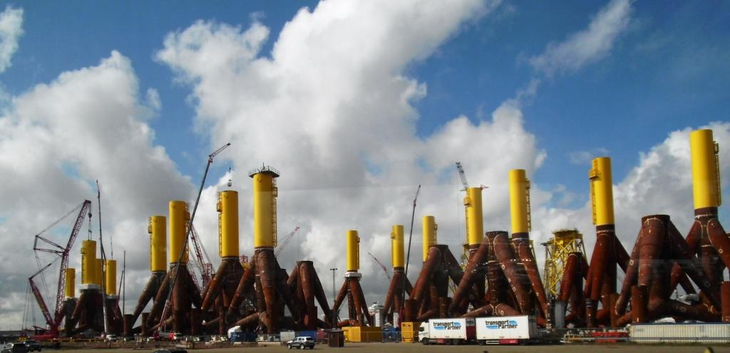 Diese Tripods werden von der Innovation transportiert